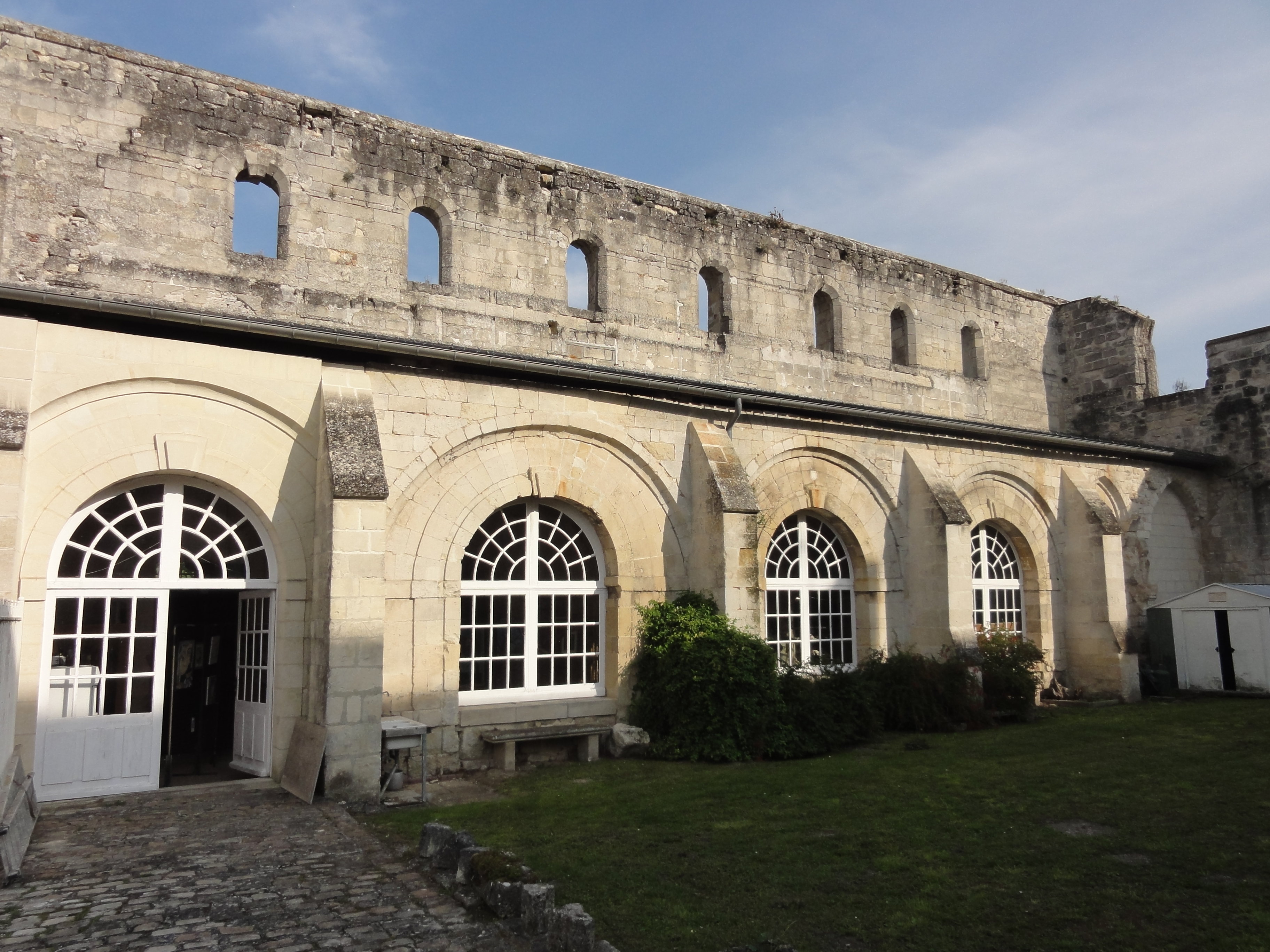 Ancien jardin du cloître, vue sur la galerie est.